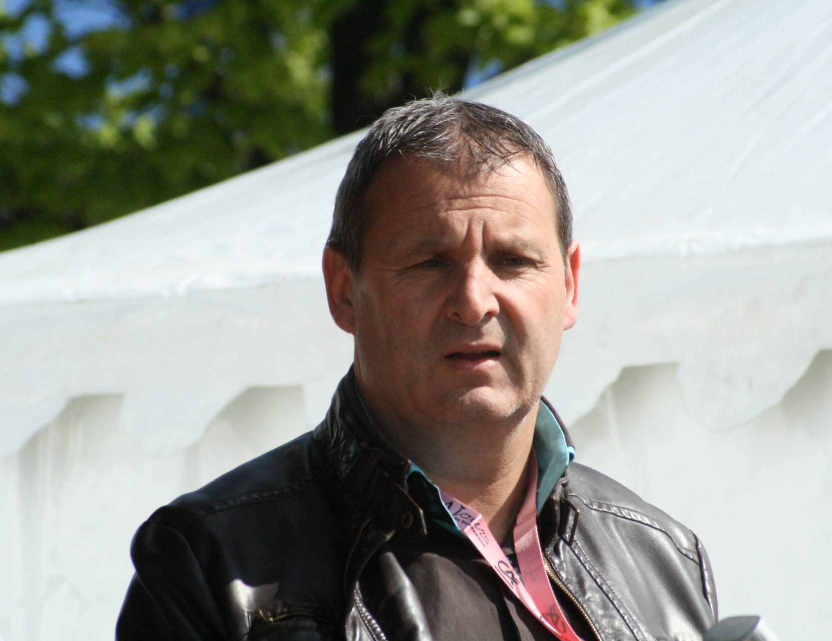 Thierry Adam lors de la présentation des équipes des 4 jours de Dunkerque